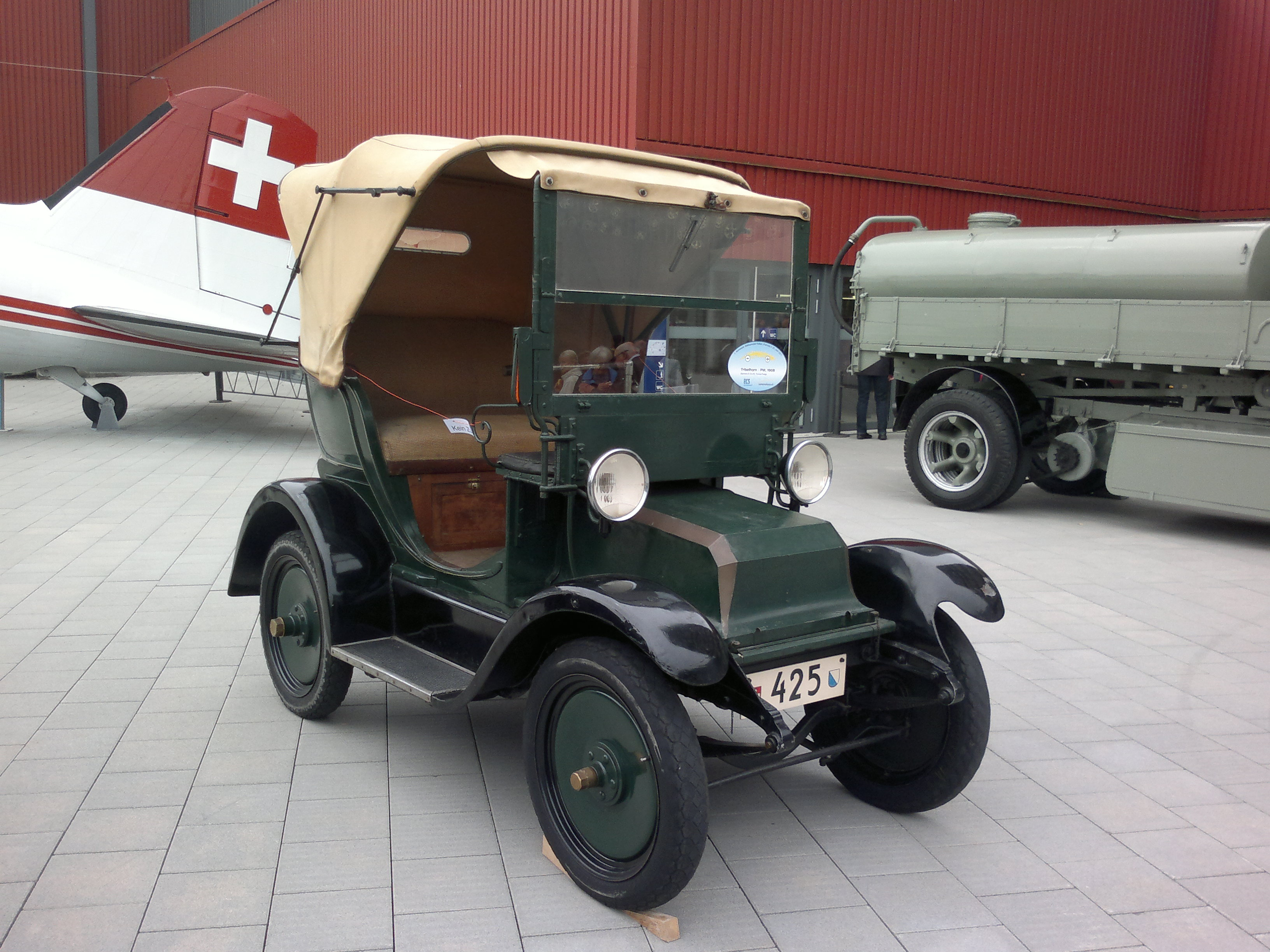 Tribelhorn Baujahr 1908. Gesehen im Verkehrshaus der Schweiz am 25.06.2011 anlässlich des 1. Schweizerische Treffen historischer Elektromobile.